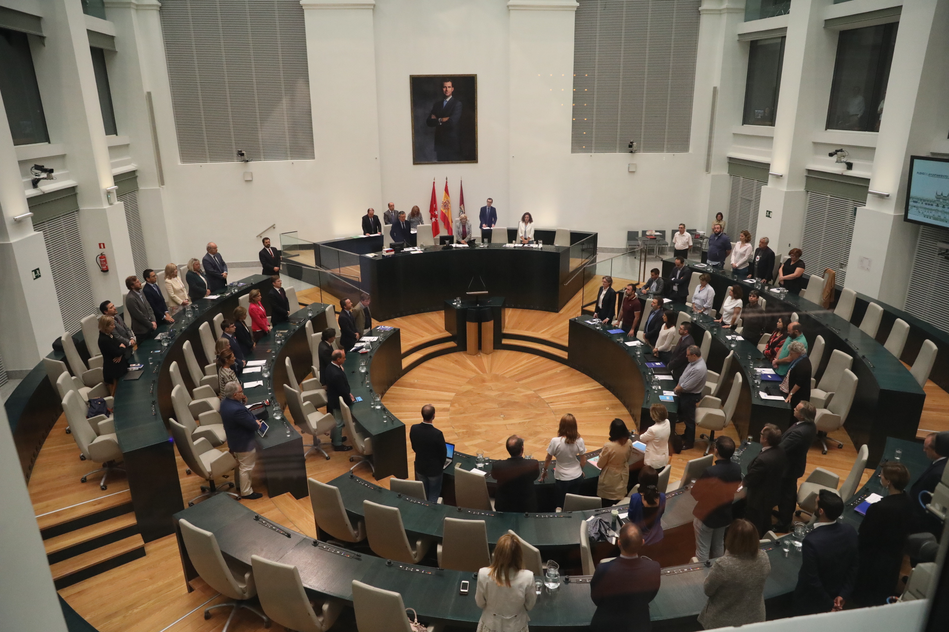 El Pleno de Cibeles ha guardado un minuto de silencio por las casi 300 personas fallecidas en los atentados con camiones bomba que tuvieron lugar el sábado en el centro de la capital de Somalia, Mogadiscio. La iniciativa ha partido de la alcaldesa del Ayuntamiento de Madrid, Manuela Carmena.